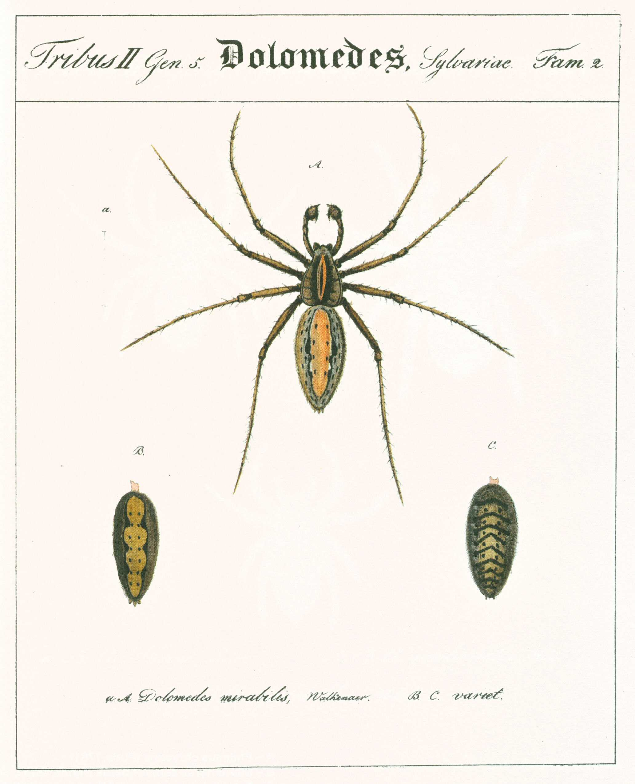 Ein frühes Portrait von Pisaura mirabilis (♂) - Colorierte Lithographie C. W. Hahns von 1827 - mit drei Zeichnungsvarianten des Opisthosomas von dorsal. Anmerkungen:Zugehöriger Text des Originals ("Wittenberger Exemplar") nach Sacher 1988, S. 67: "Tafel II. Die Wald-Wunderspinne. In Wäldern und Gebüschen, auch im hohen Grase. Aendert hinsichtlich der Färbung des Hinterleibes sehr ab.", "Tab. II. Dolomodes mirabilis, Walkenaer. Aranea obscura, Fabr. Dolomodes mirabilis, Walk. Latr. In silvis et fruticetis, aeque ac in gramine. Ad abdominis colorem quod attinet, variat." Nach Sacher 1988, S. 126 handelt es sich bei den Tafeln in Heft 5 um Lithographien, vgl. S. 43 (Anzeige zu Heft 3: "illuminirte Kupfertafeln")